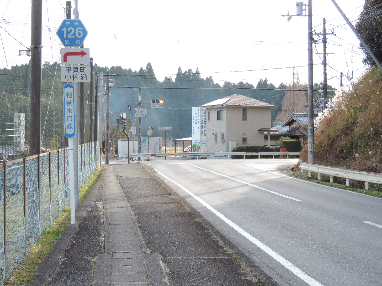 滋賀県甲賀市甲賀町小佐治のja:滋賀県道126号相模水口線。